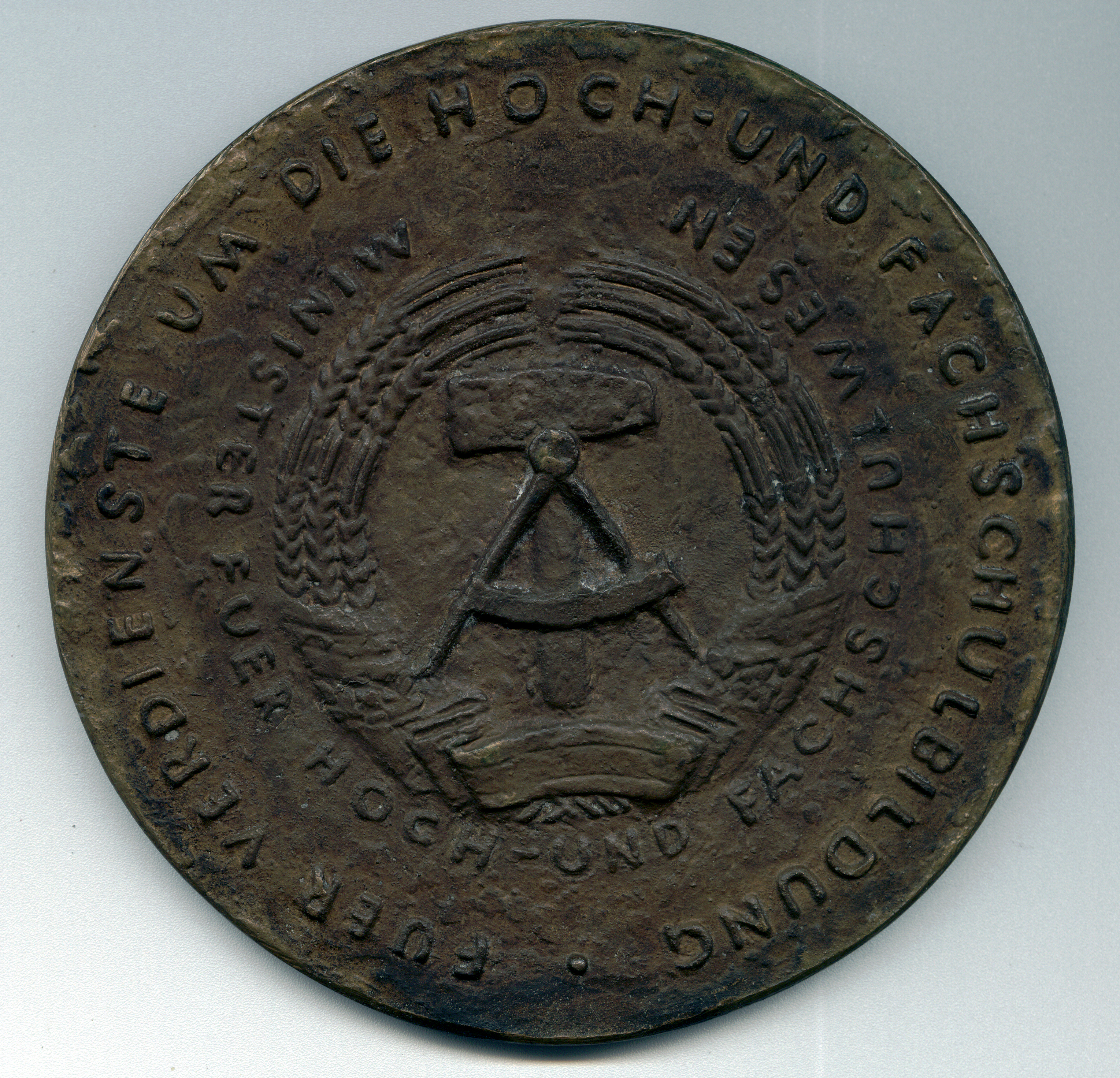 Ehrenplakette des Ministers für Hoch- und Fachschulwesen der DDR für „Verdienste um die Hoch- und Fachschulfortbildung“ - East Germany - DDR - Die Verleihung der Ehrenplakette erfolgte persönlich in Berlin - durch den Minister für Hoch- und Fachschulwesen der DDR - Nur wenige Verleihungen sind erfolgt - diese waren verbunden mit der Eintragung in das "Ehrenbuch".